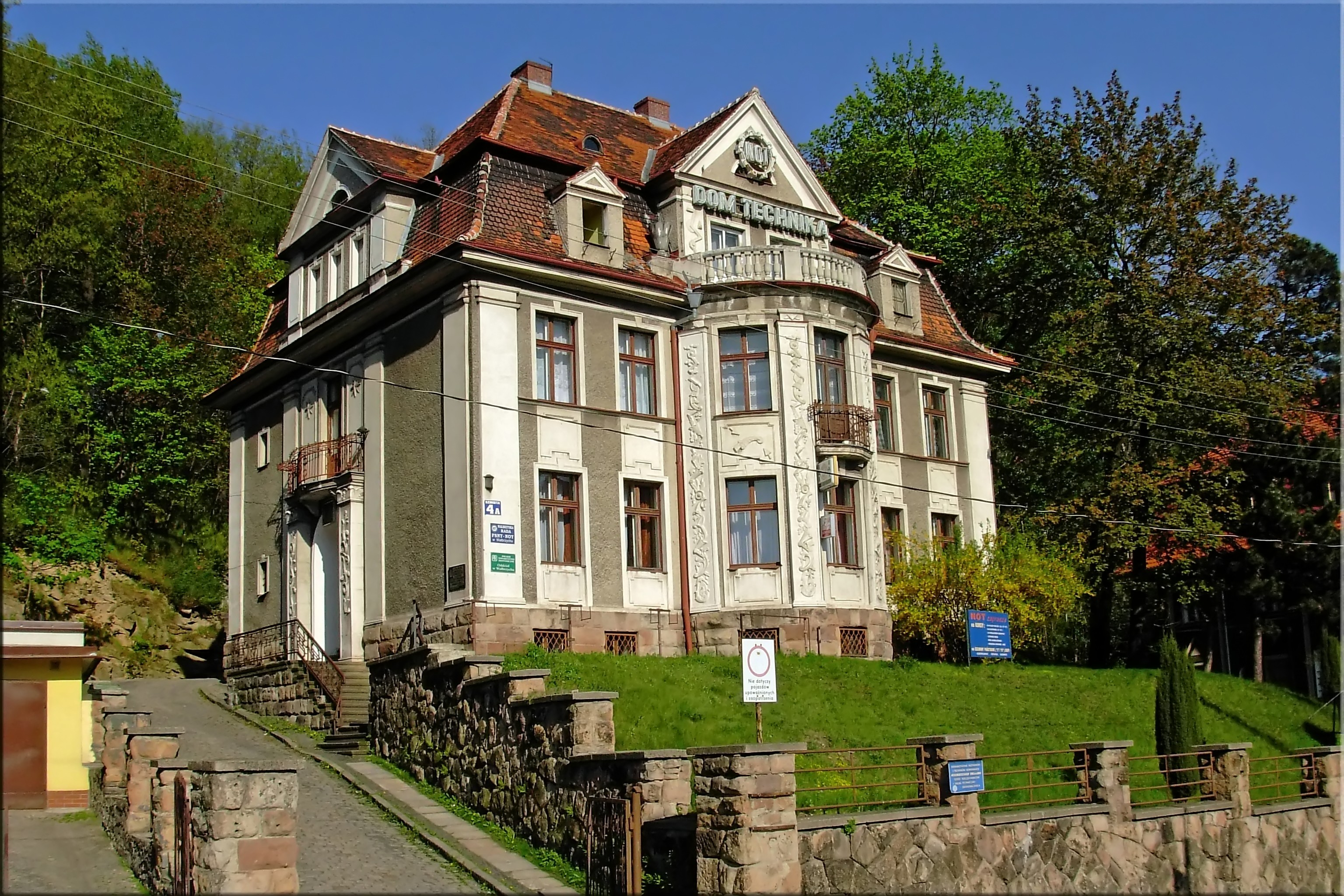 Wałbrzych - Dom Technika